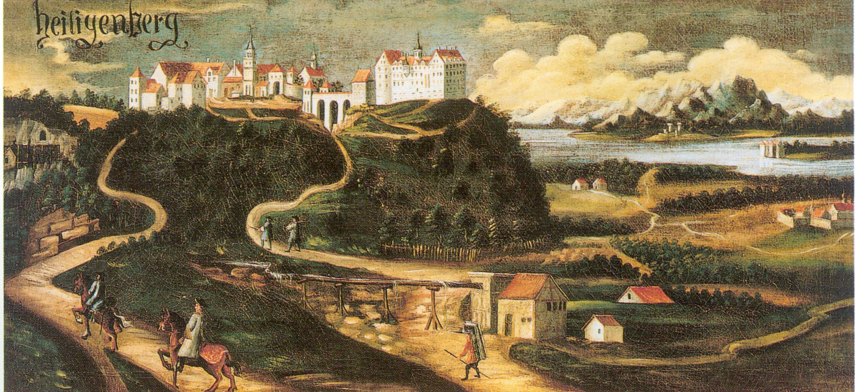 Schloss Heiligenberg Ölbild